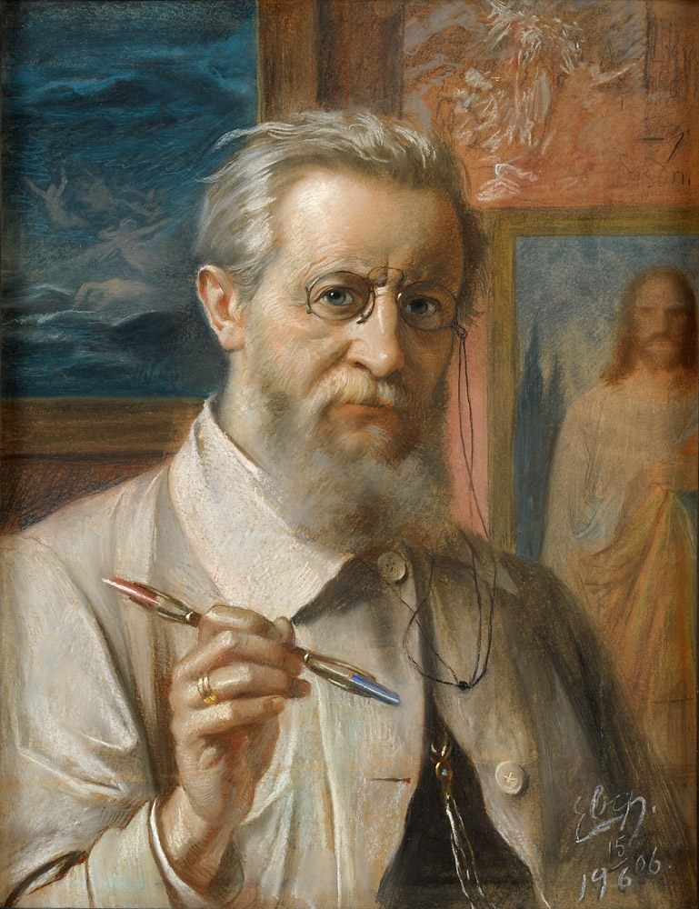 Selbstportrait. Signiert. Datiert (19) 06. Pastell. 65 x 50 cm